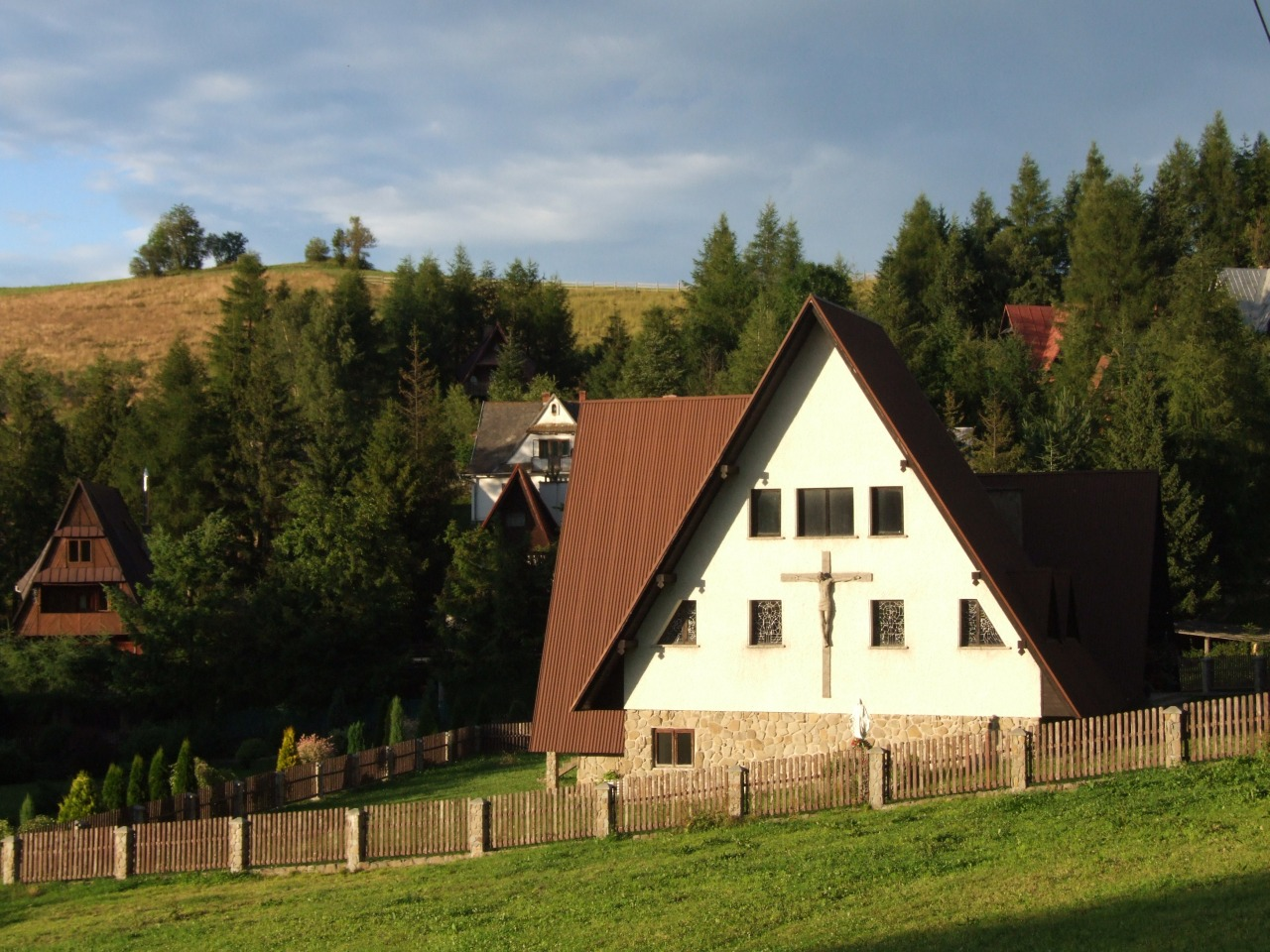 Kaplica na Przełęczy Przysłop (pomiędzy Gorcami i Beskidem Wyspowym)